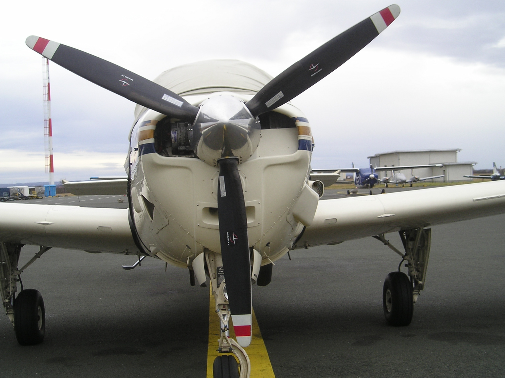 Propeller